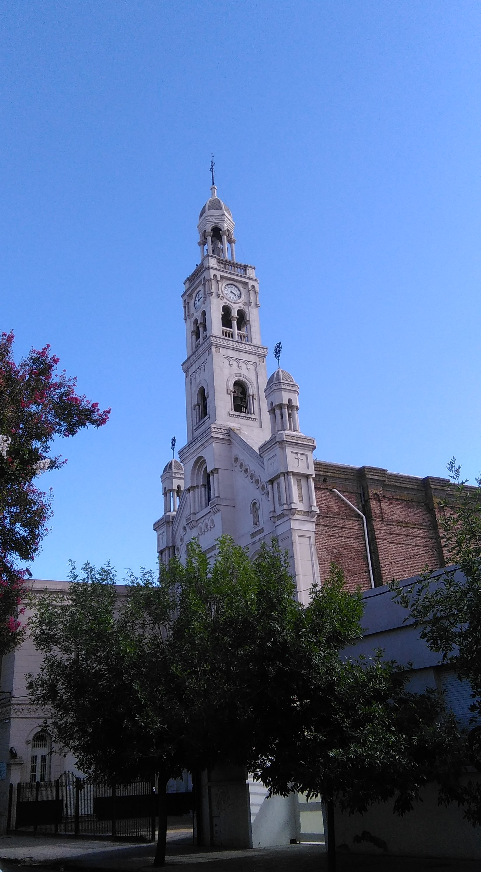 Fachada de la Parroquia Inmaculado Corazón de María, Bahía Blanca